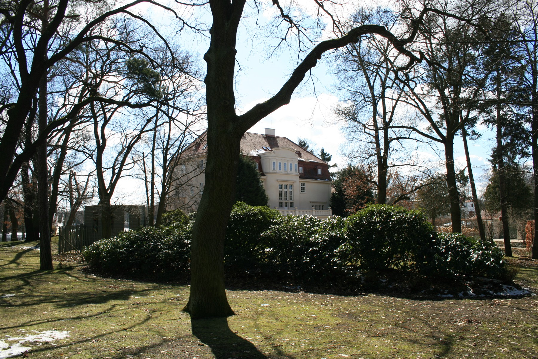 Potsdam OT Neu Fahrland, Villa von Diringshofen. Ansicht von Heinrich-Heine-Weg. Baudenkmal